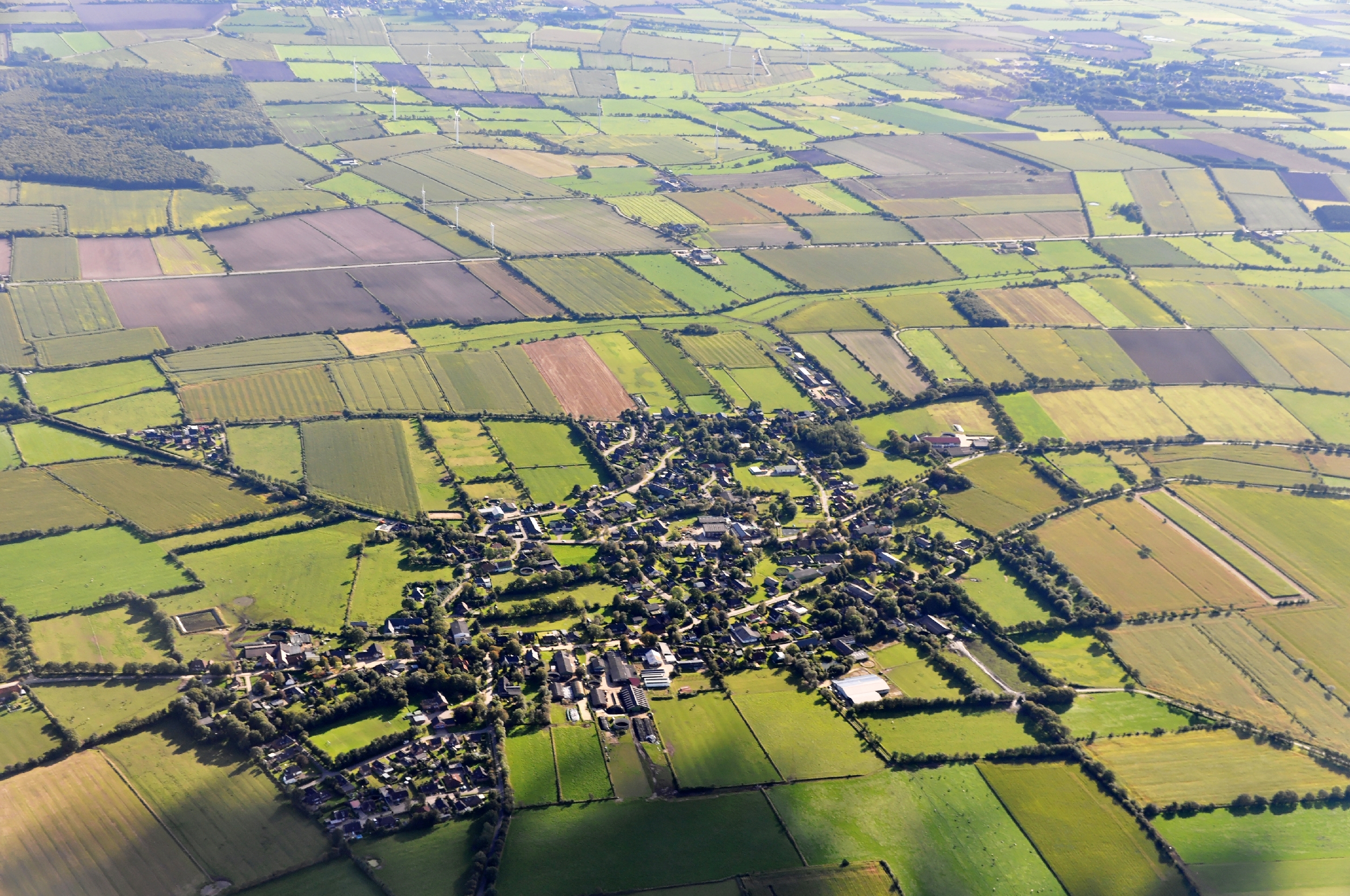 Luftaufnahmen Nordseekueste 2013-09